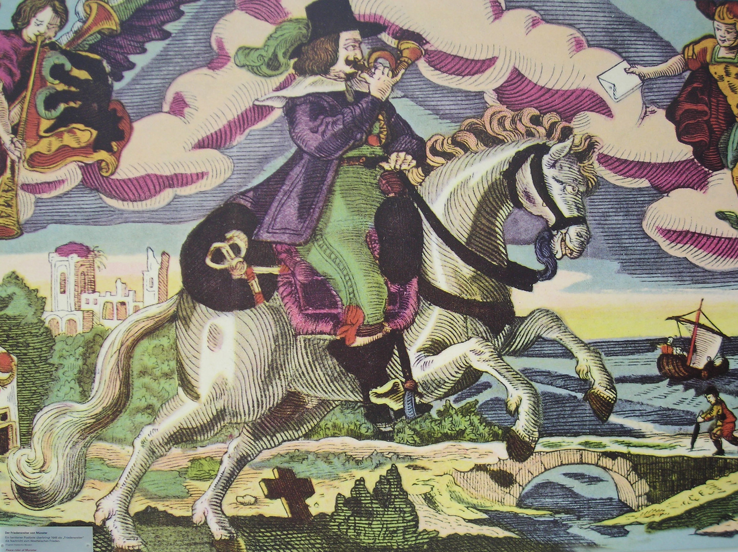 Der Friedensreiter von Münster, ein Postreiter überbringt die Nachricht vom Westfälischen Frieden 1648. Exponat im Deutschen Museum Verkehrszentrum, Halle I.